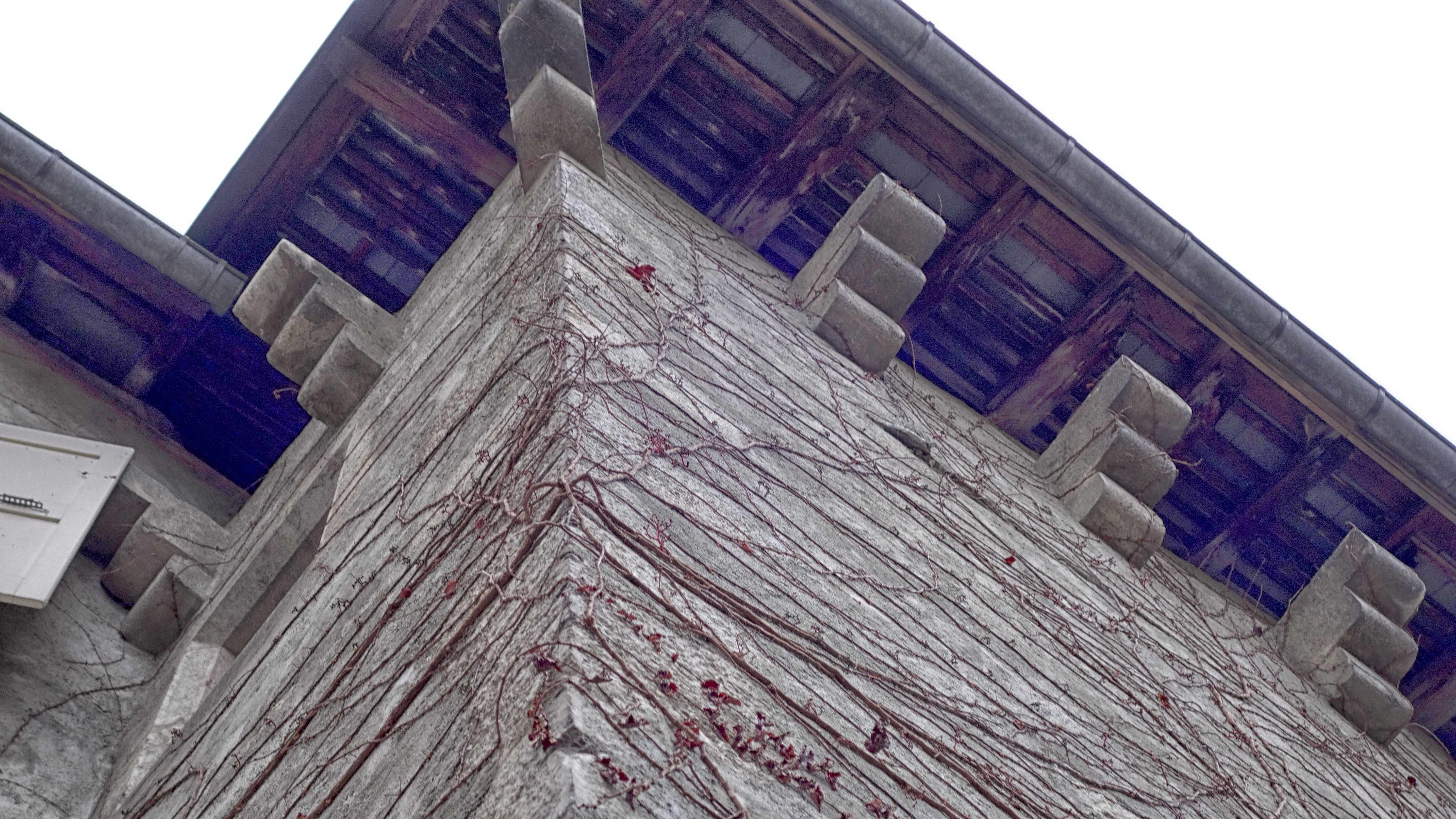 détail des corbeaux de sablière, tour ouest du château des Allues